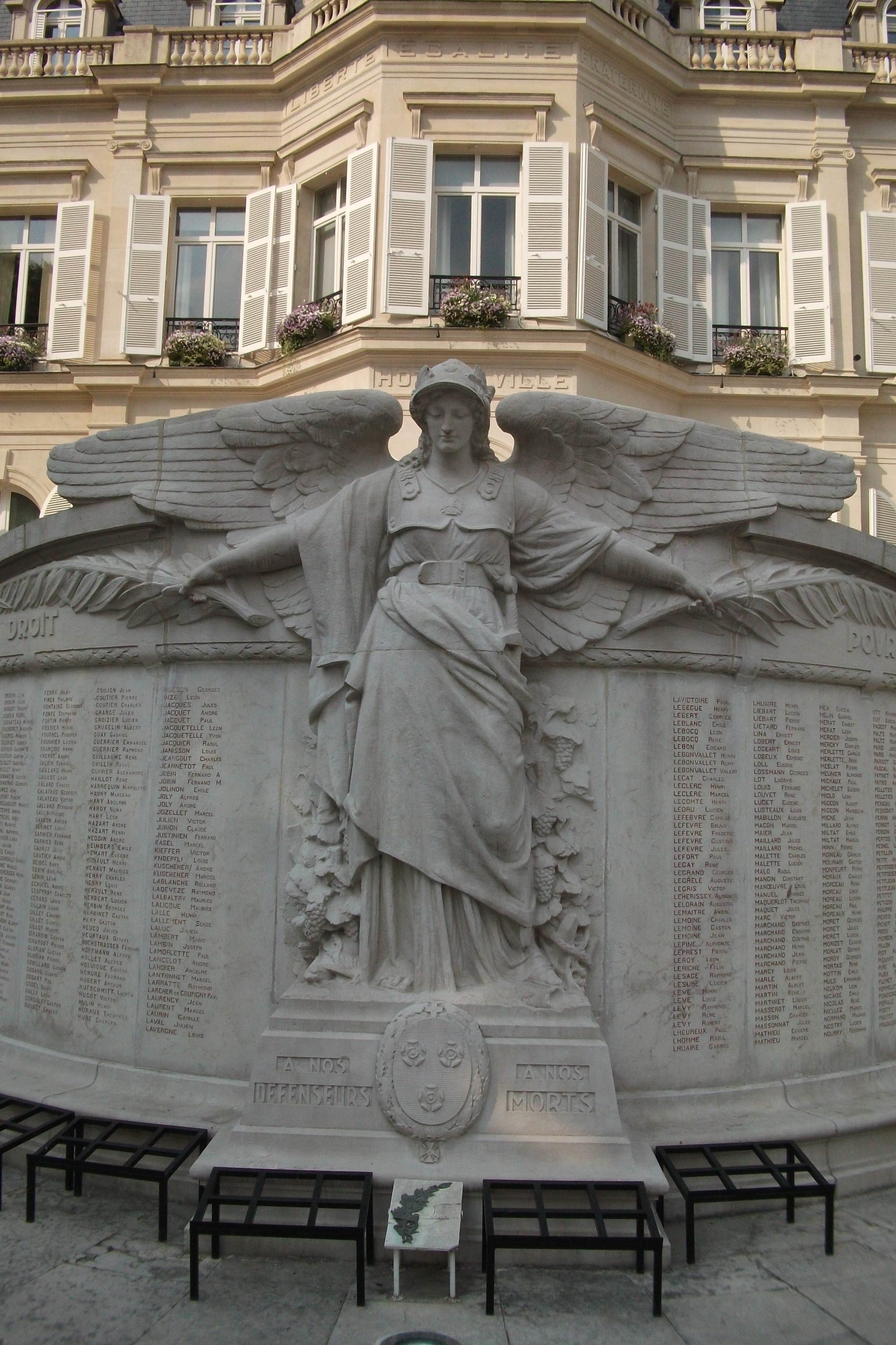 détail du monument aux morts et mairie en arrière plan .